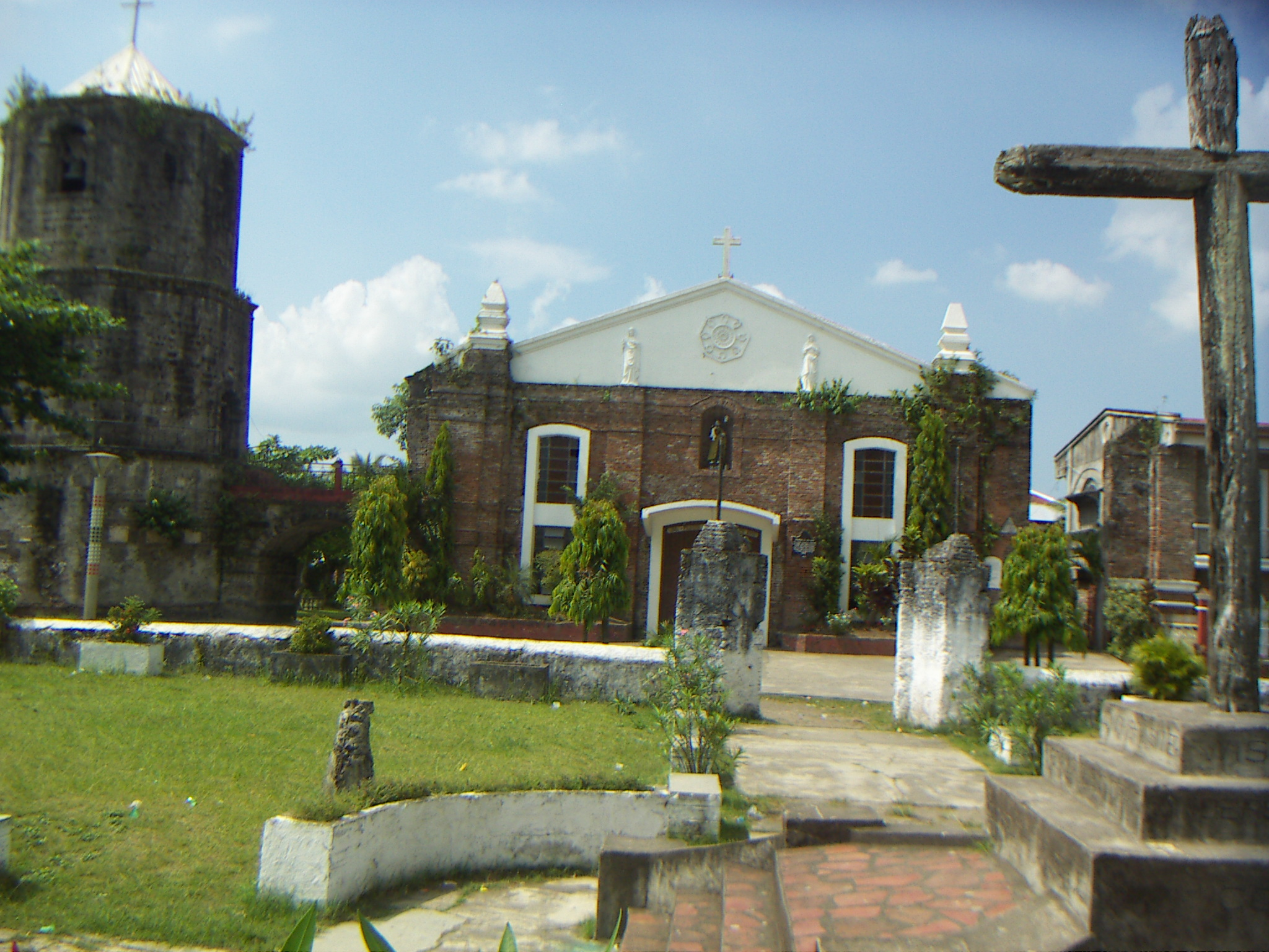 Milaor, Camarines Sur, Philippines